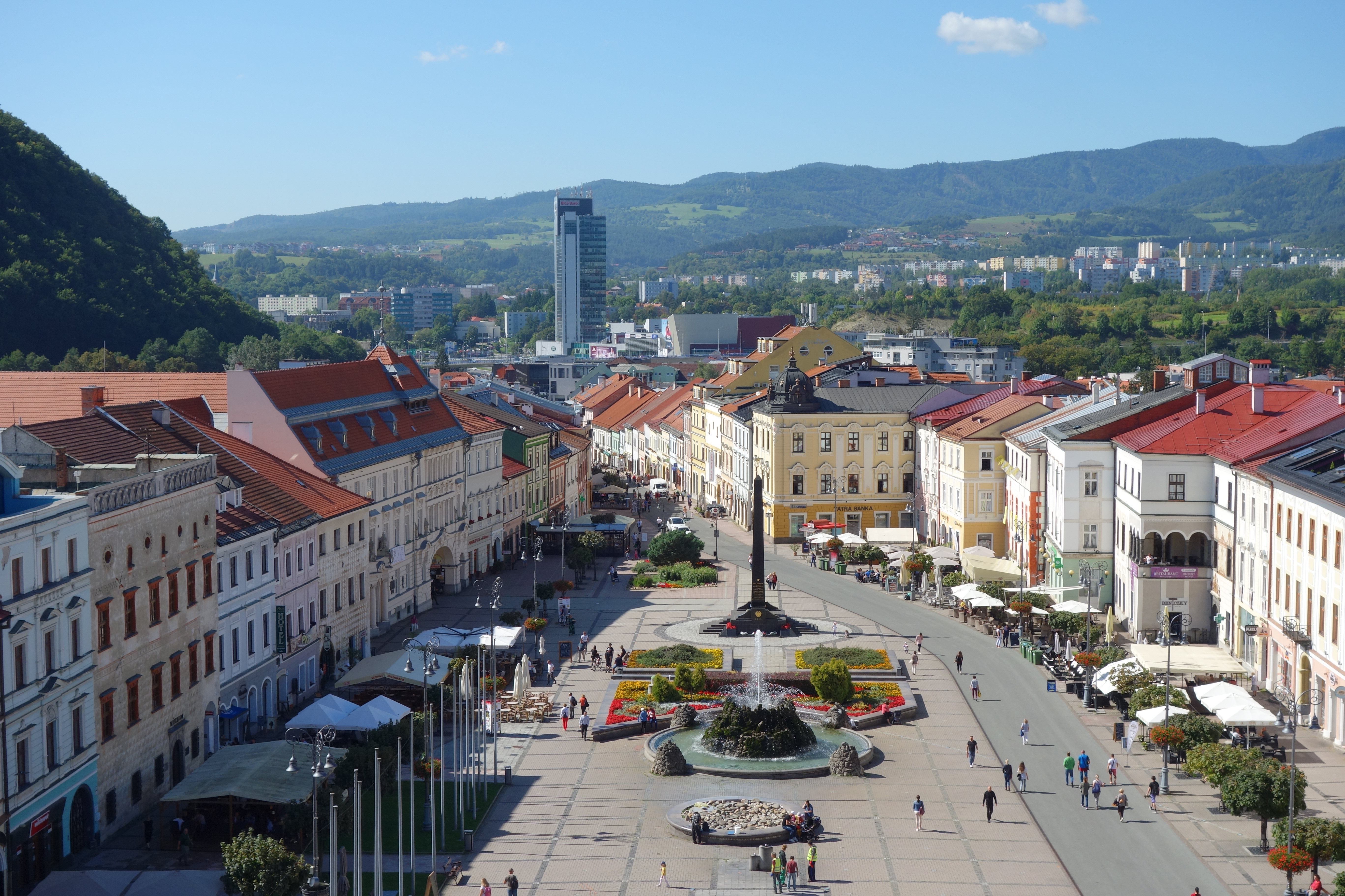 Banská Bystrica, Námestie SNP